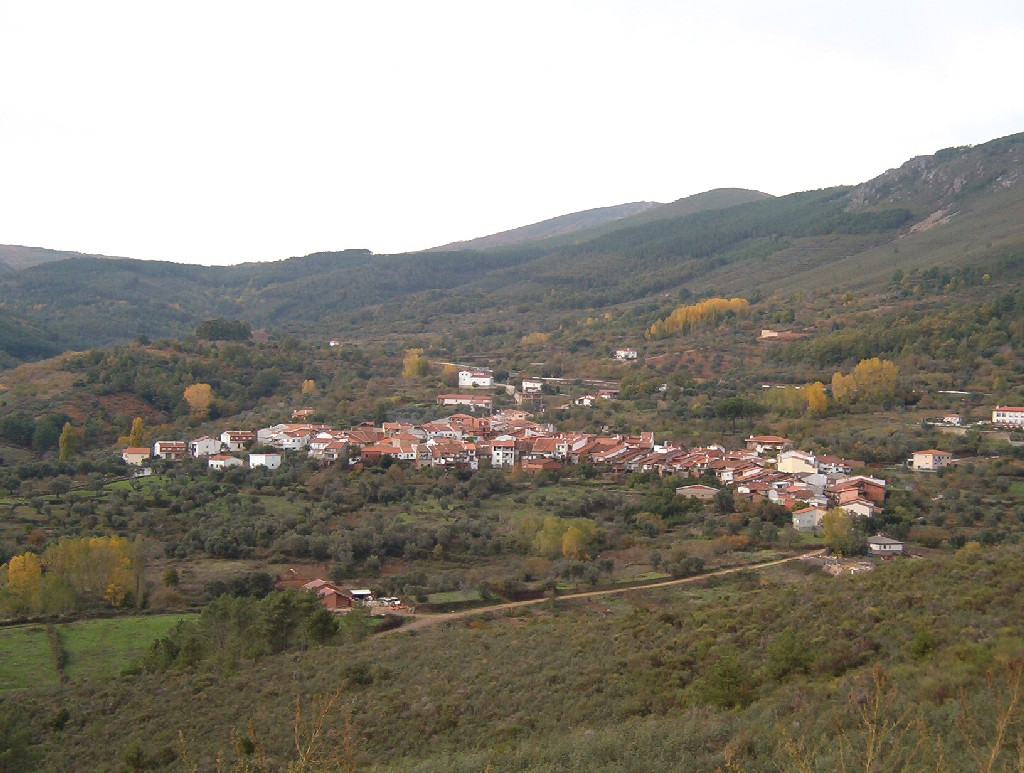 Foto del pueblo de Garcibuey (Salamanca) tomada desde la zona del antiguo campo de fútbol. Foto tomada por mí sobre Noviembre de 2003.